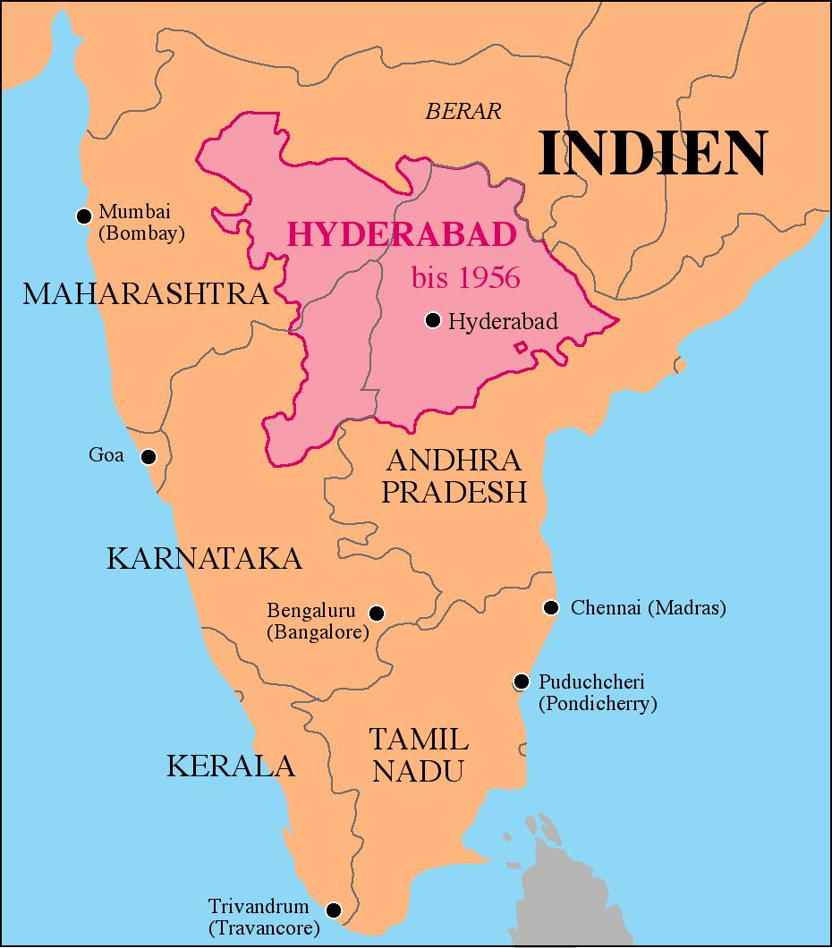 Karte des Staates Hyderabad bis 1956